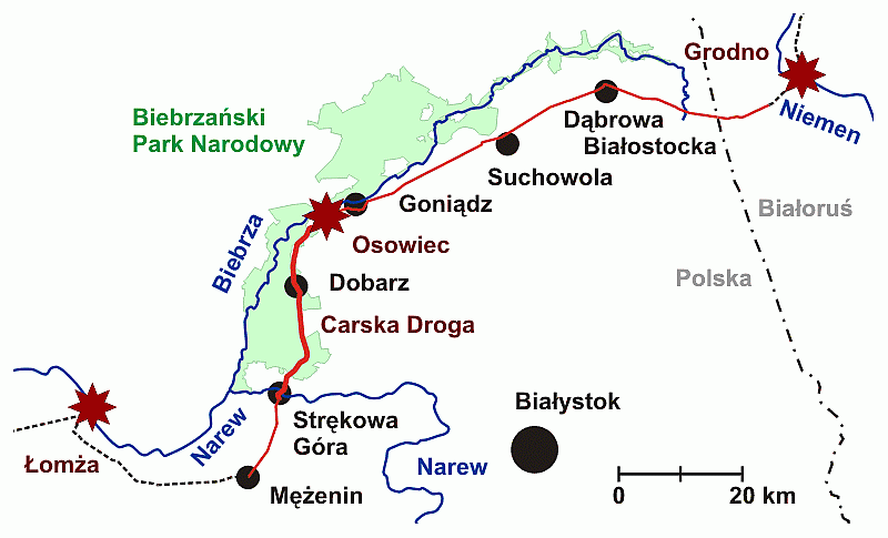 Fragment drogi podpisywany czasem na mapach jako Carska Droga narysowany jest kolorem czerwonym, pogrubioną linią odcinek Strękowa Góra - Twierdza Osowiec biegnący m.in. przez bagna Biebrzańskiego Parku Narodowego. Szlak turystyczny. Inne nazwy drogi to Carski Trakt, Carska Szosa.